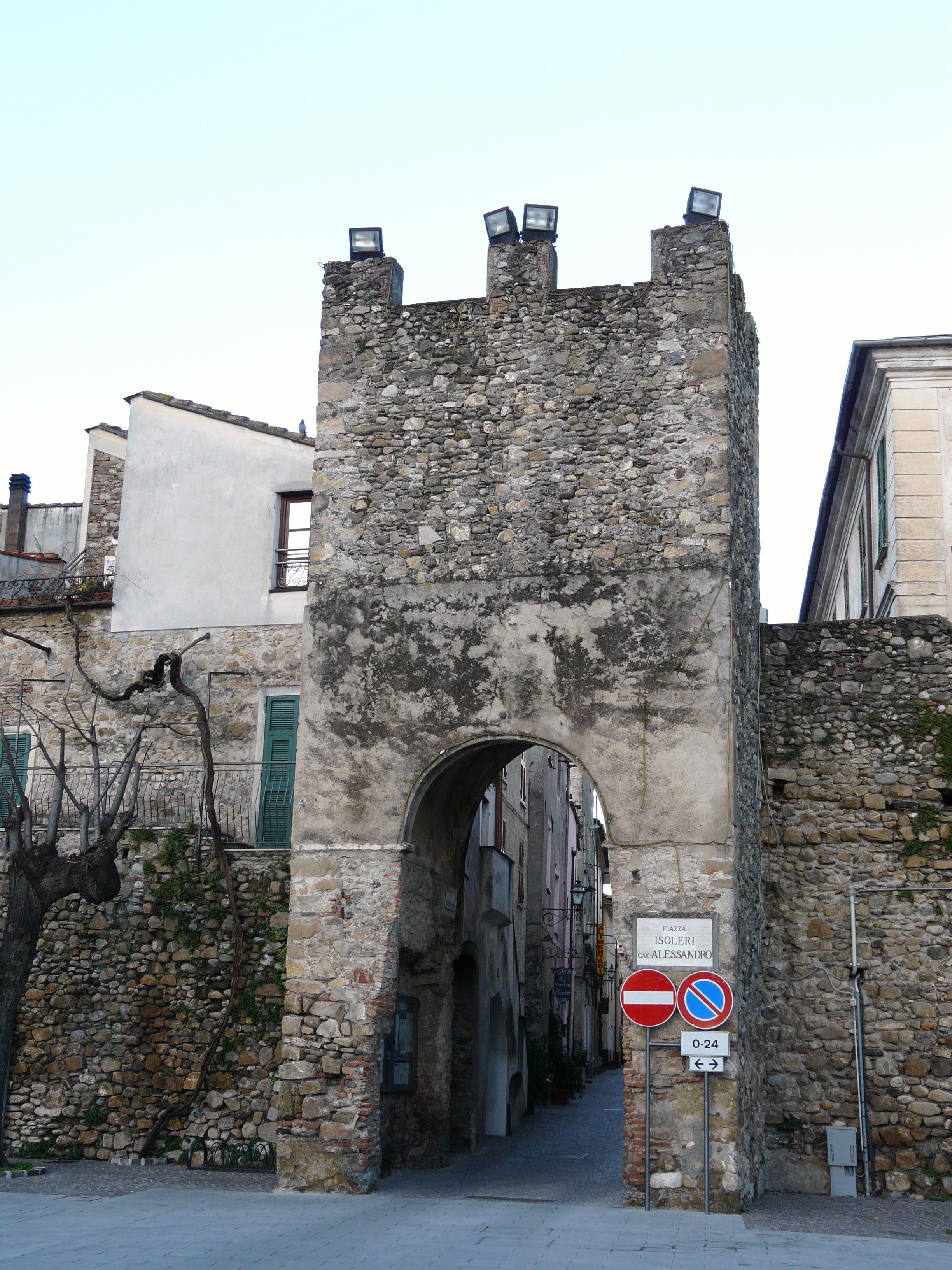 Mura e torri di Villanova d'Albenga, Liguria, Italia